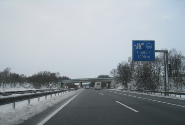 A1 - Kreuz (66), Holdorf (1000m), 16 km from Vechta, Deutschland (Zone 32).